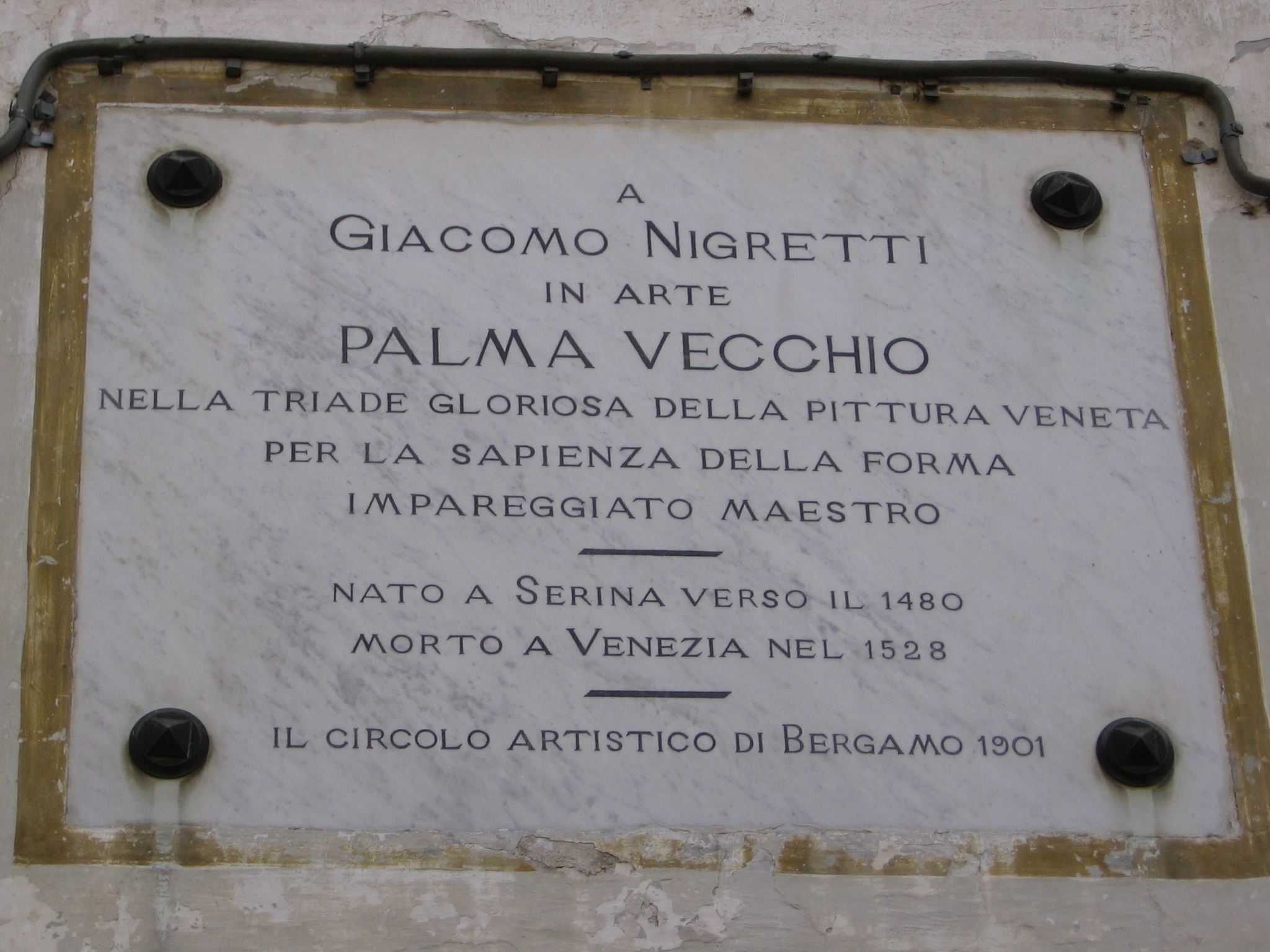 Serina, Bergamo, Italia